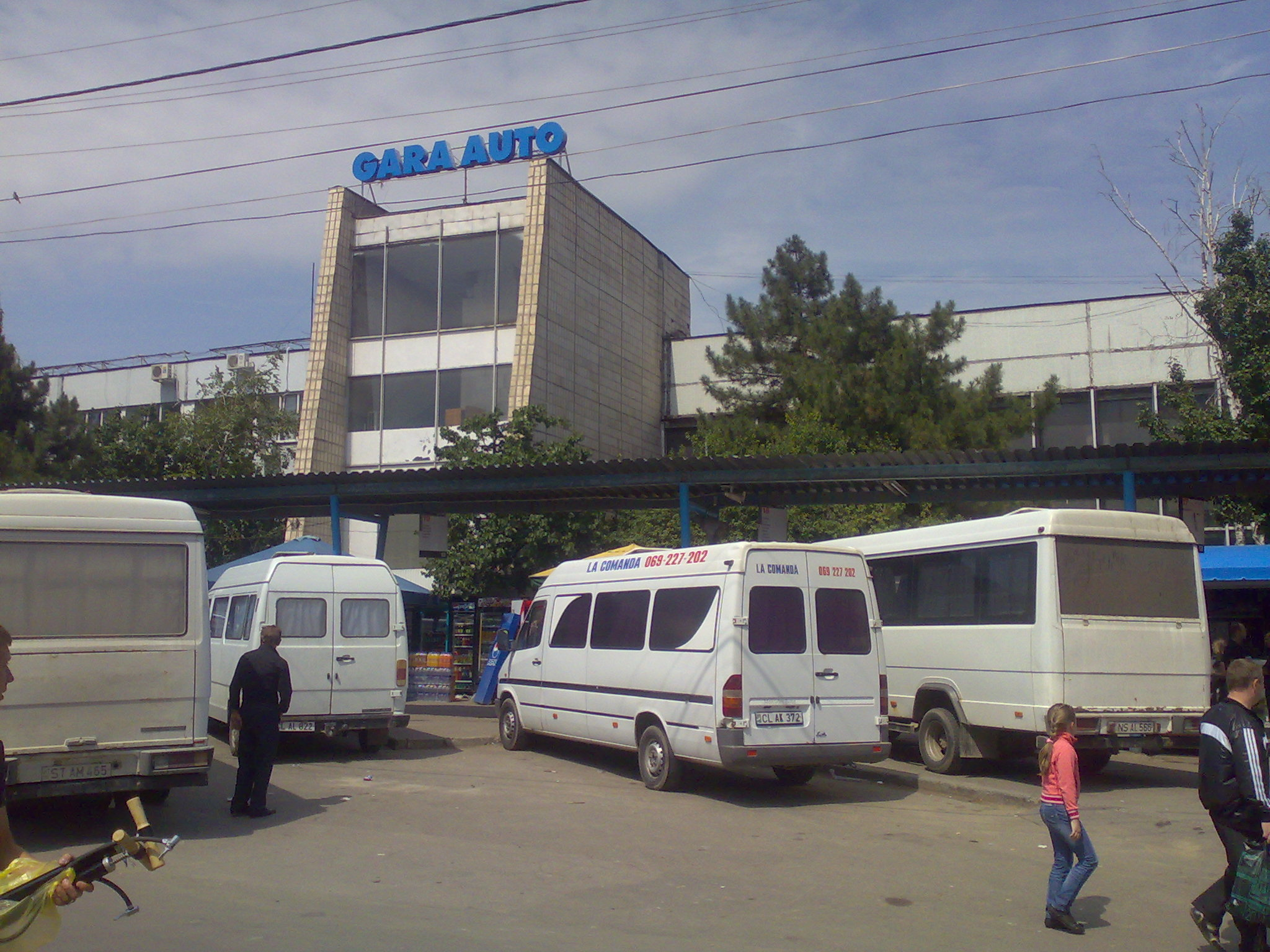 Центральный автовокзал Кишинёва